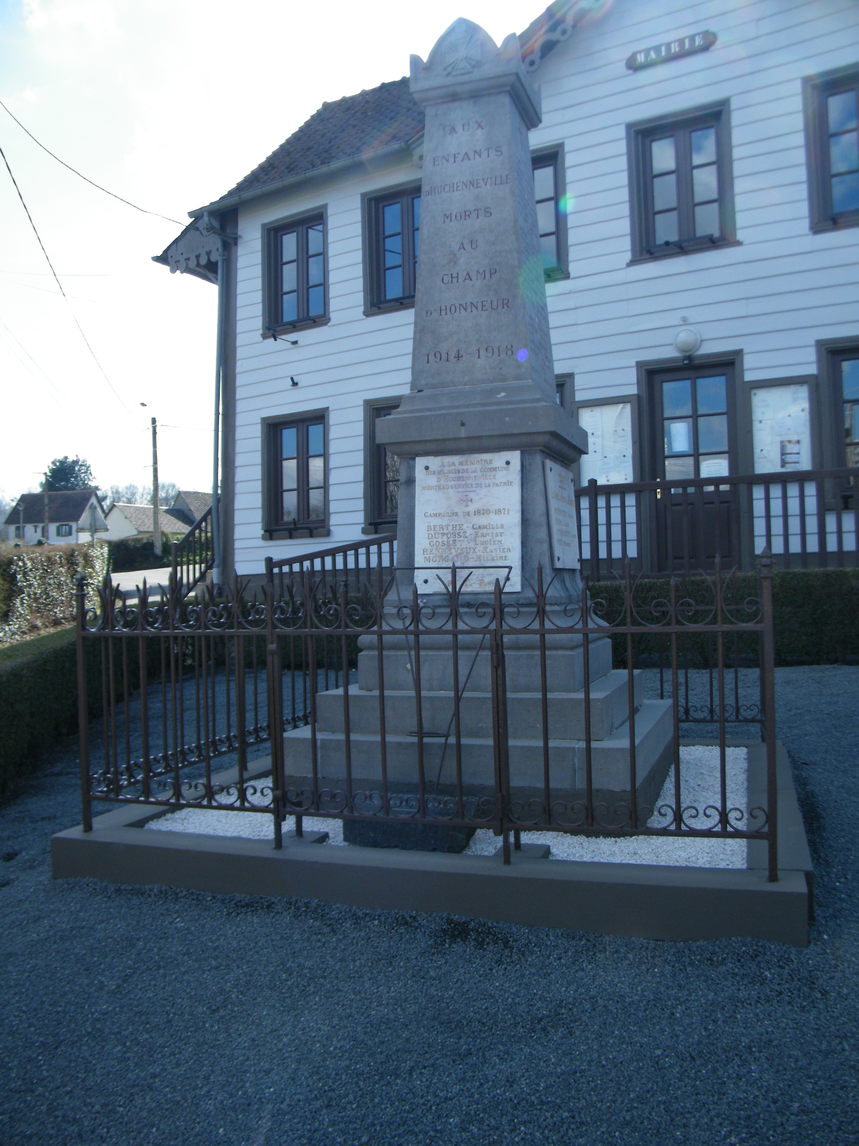 Le monument aux morts pour la patrie.